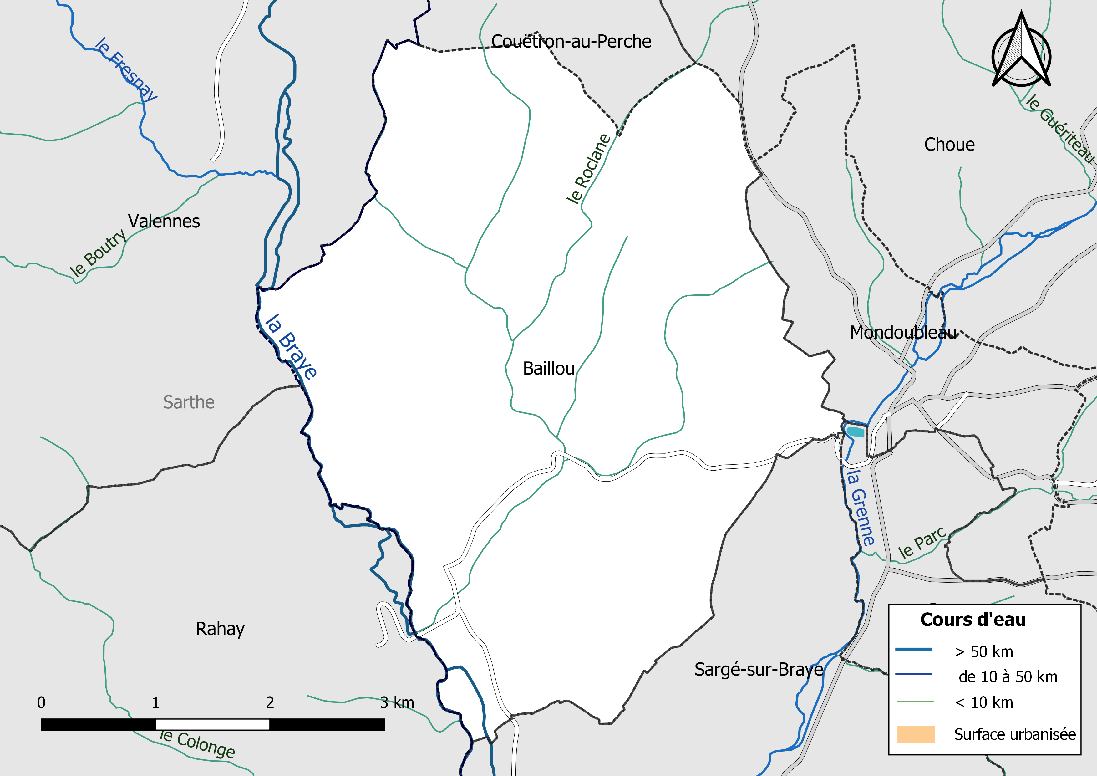 Carte du réseau hydrographique de la commune de Baillou (France).